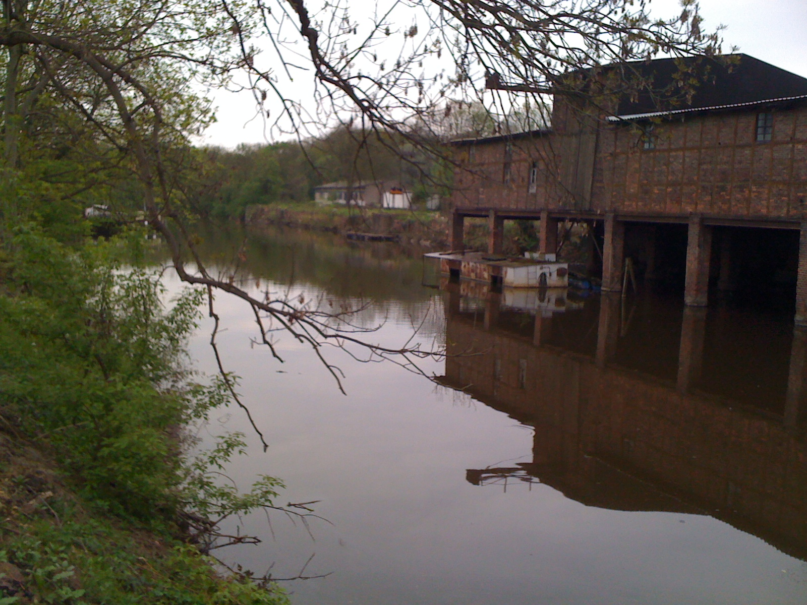 Sophienhafen Halle